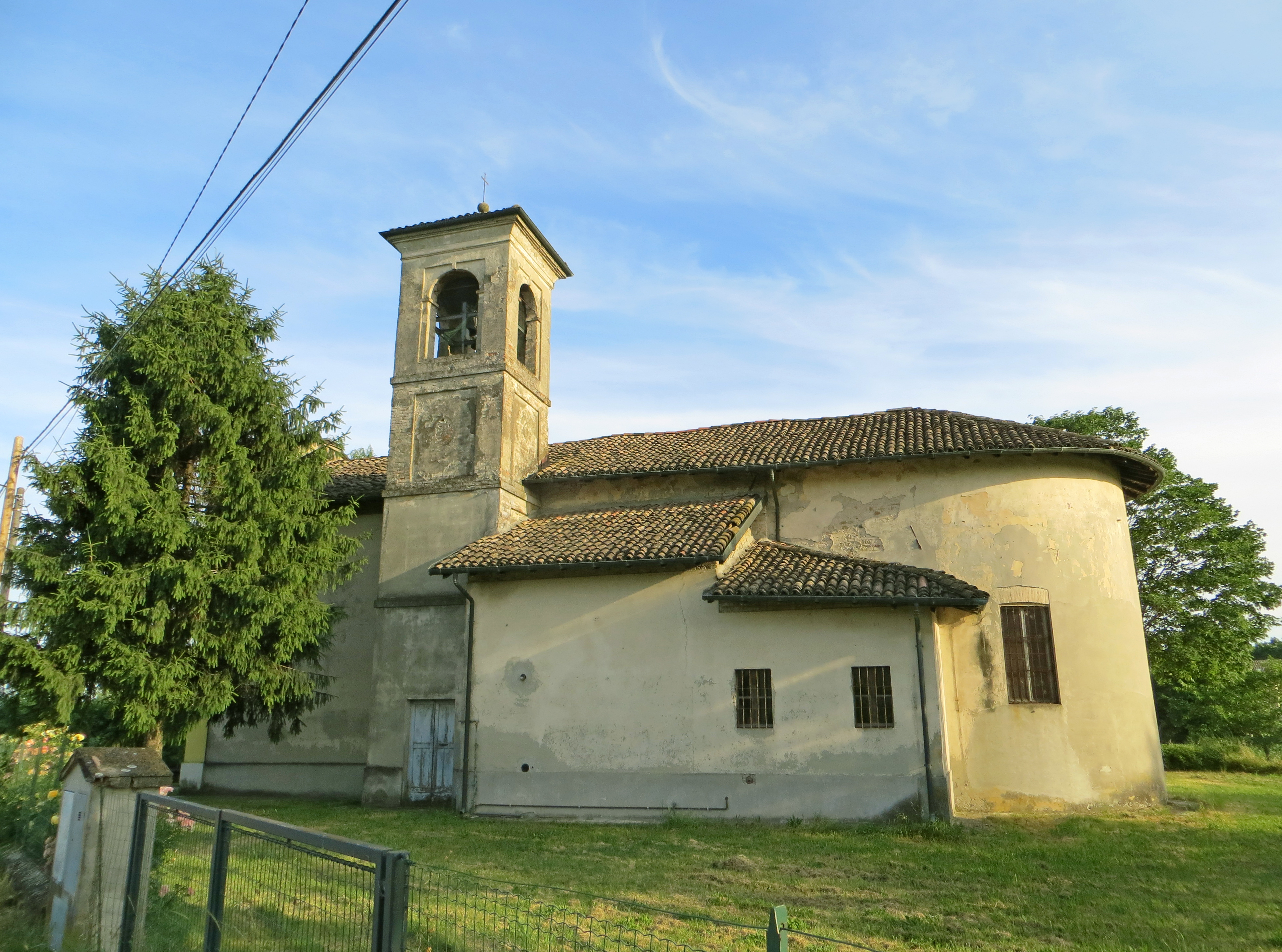 Chiesa di San Lorenzo (Moletolo, Parma) - lato nord